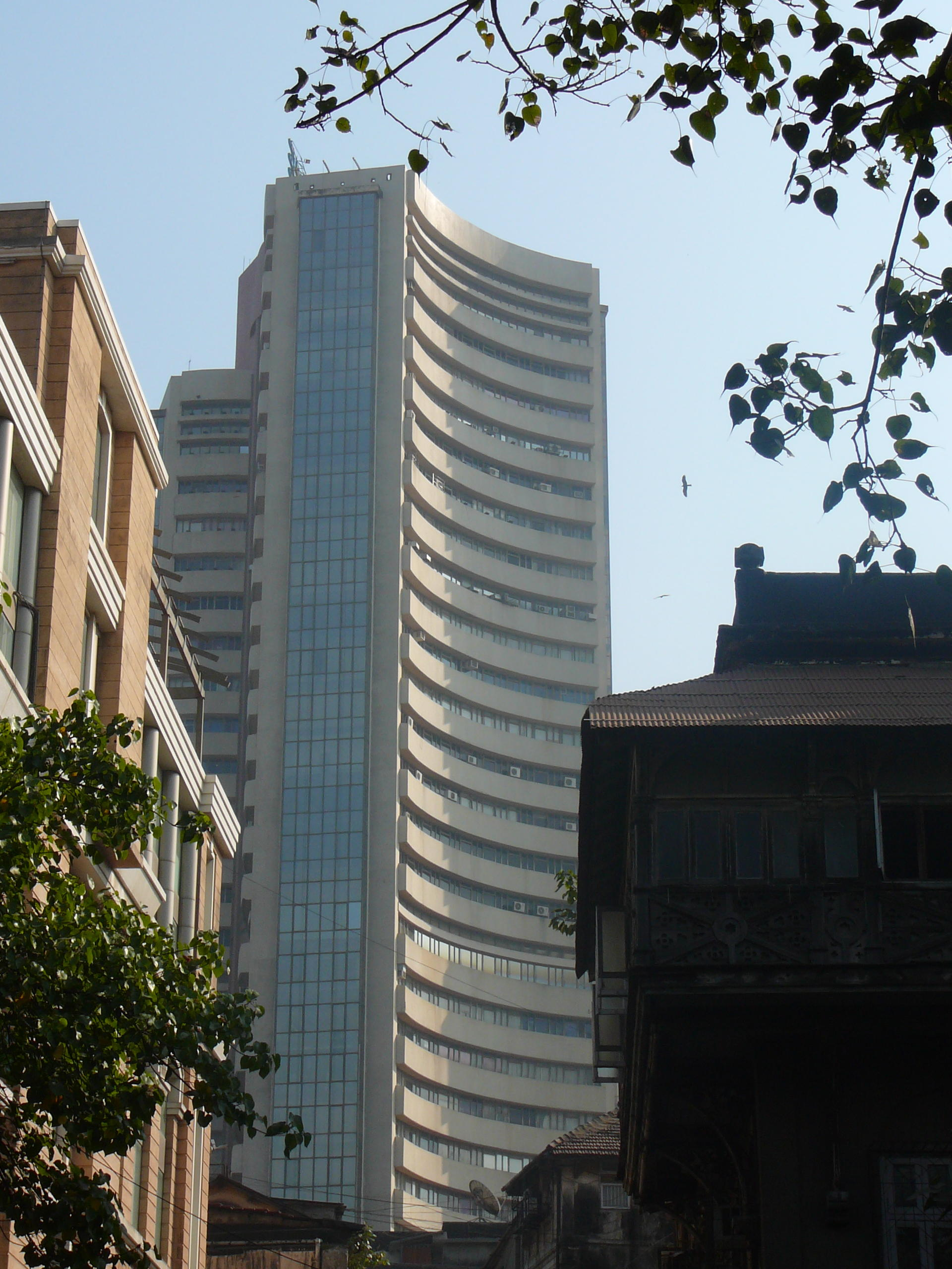 Bombay Stock Exchange